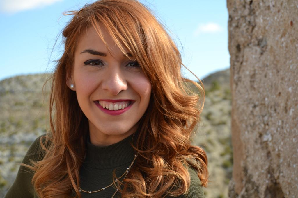 Aragonés: Foto feita en cadrete